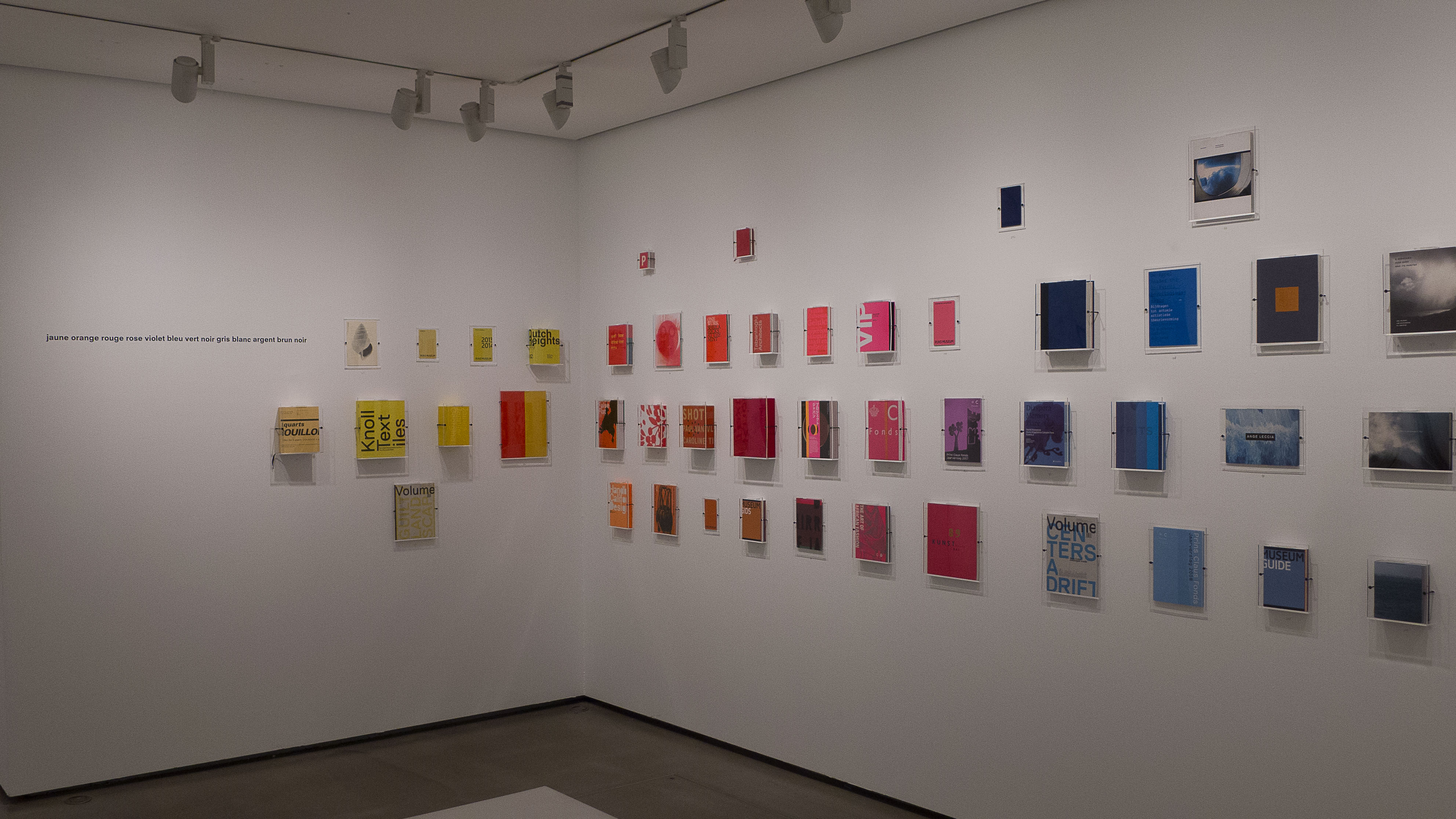 Irma Boom à l'Institut Néerlandais Diversité